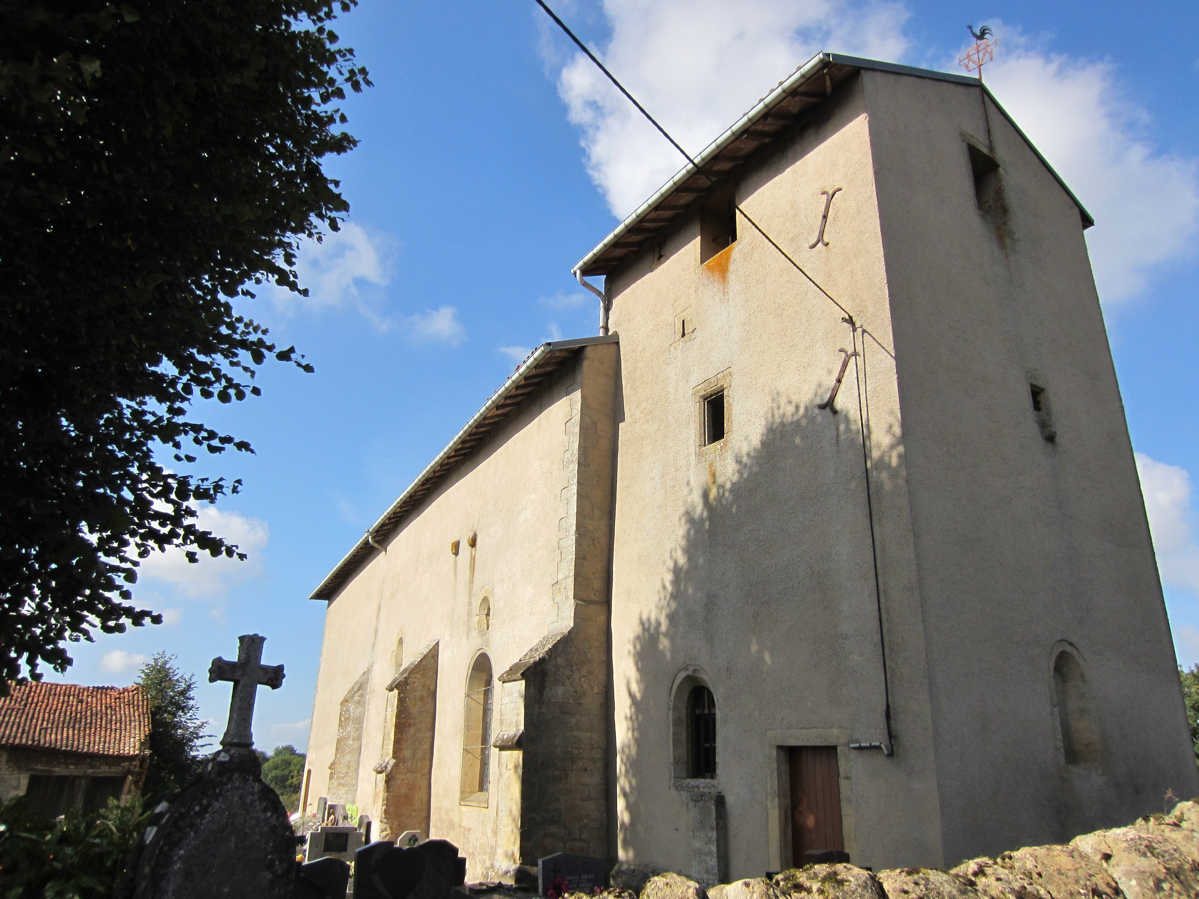 Description eglise Preutin eglise Preutin